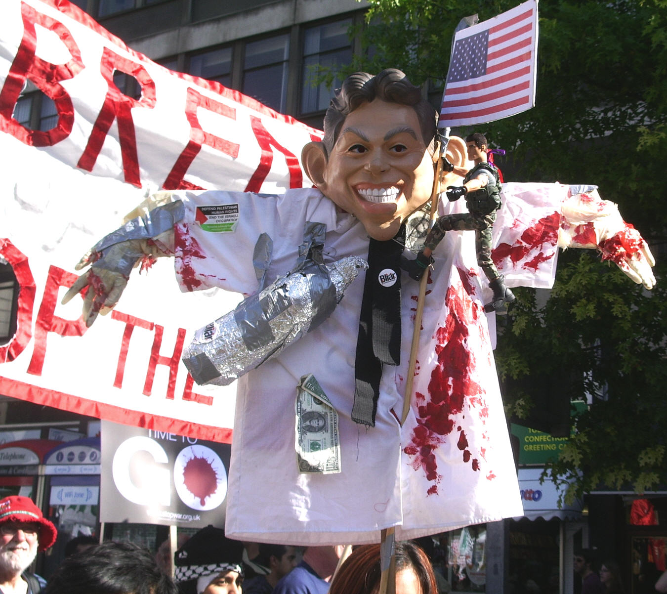 בובה בדמות בלייר בהפגנת מחאה נגדו. יריביו טענו שהוא מתרפס בפני האמריקנים, ויוצא למלחמות לא נחוצות.